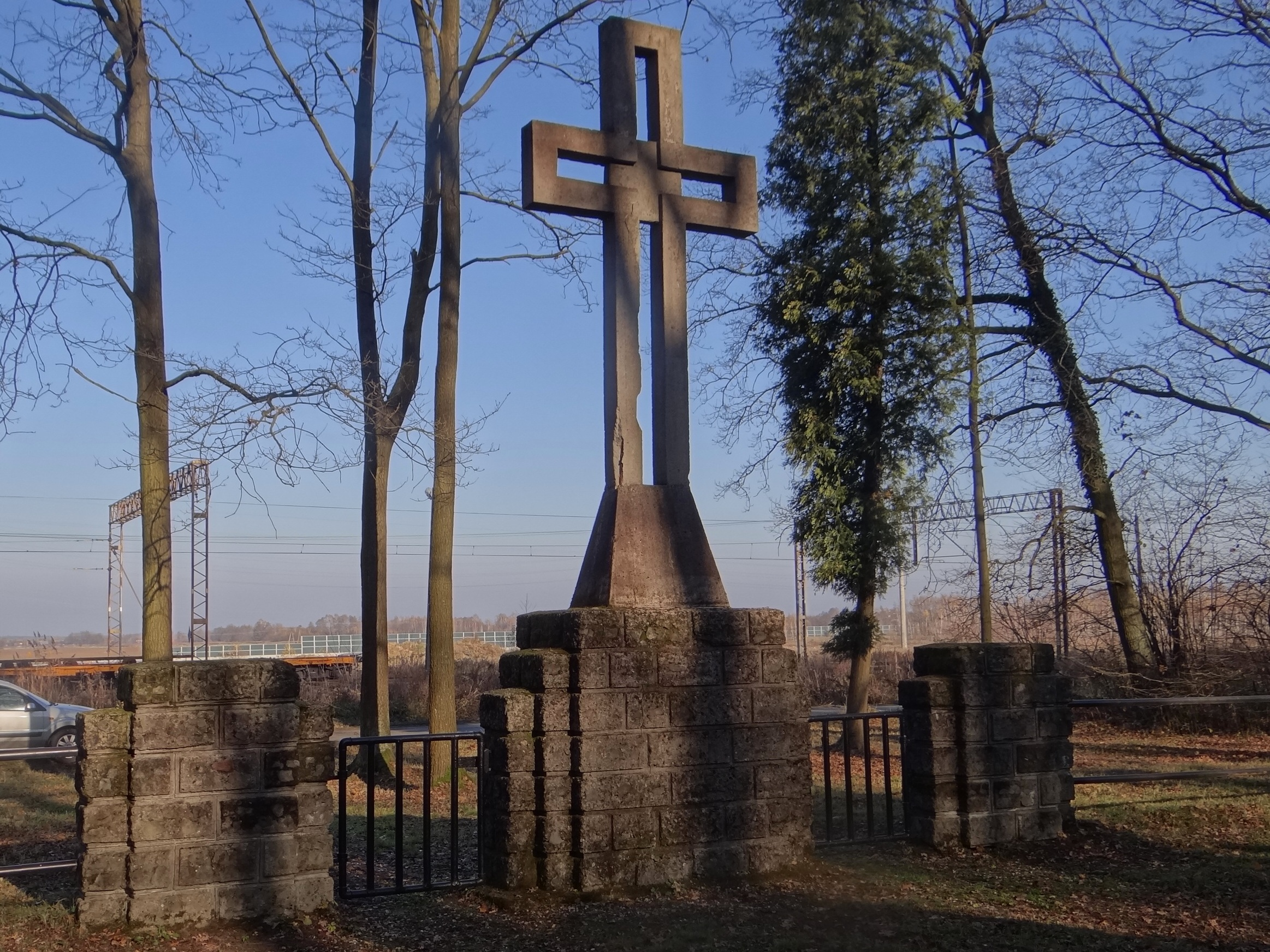 Cmentarz wojenny nr 271 w Biadolinach